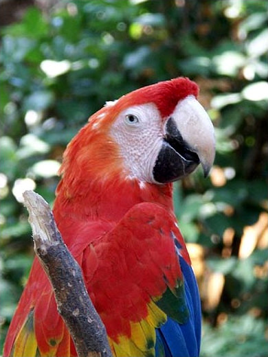 Ara macao